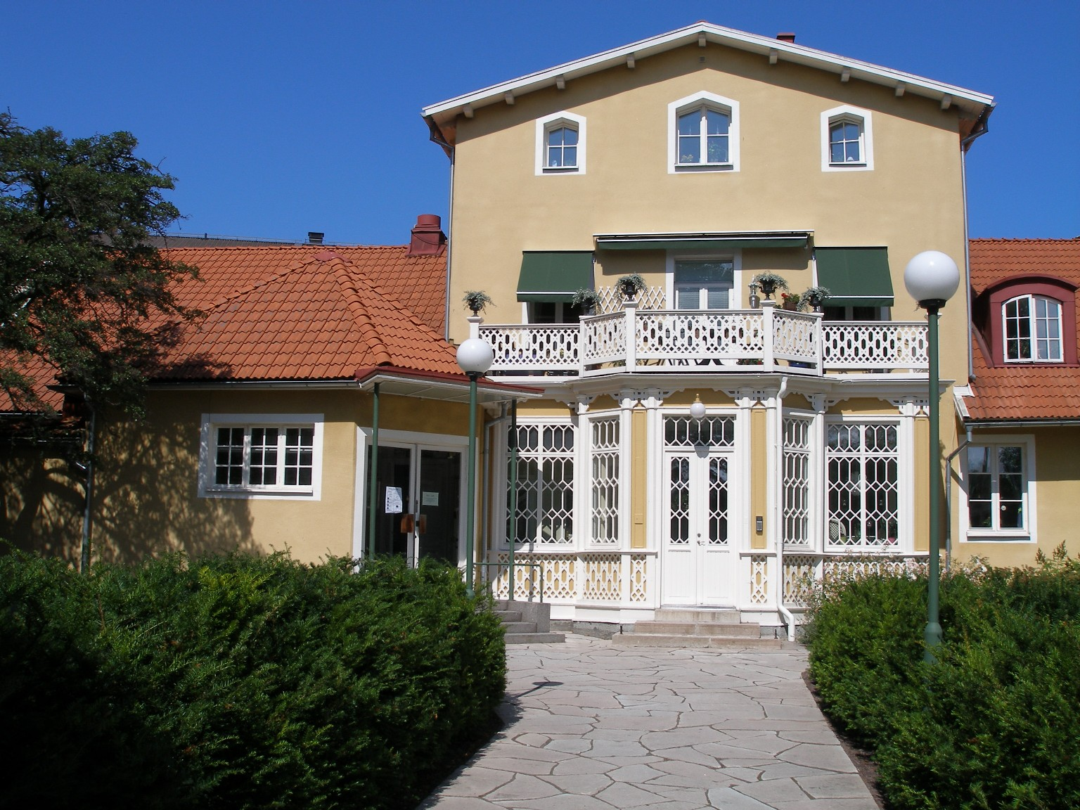 Sagabiografen i Kalmar (Saga cinema, Kalmar) Fotograf: Peter R, Kalmar